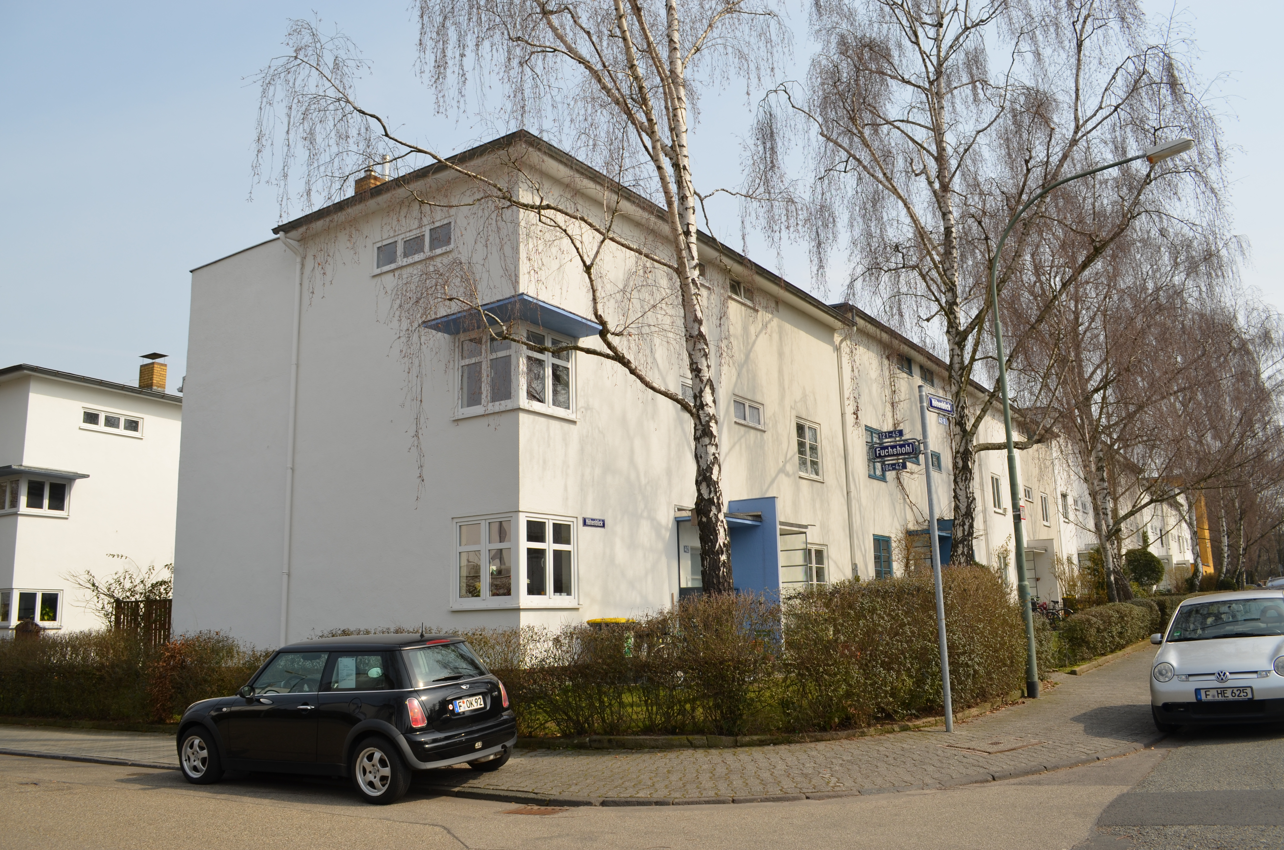 Ginheim, Siedlung Höhenblick, Straße Höhenblick